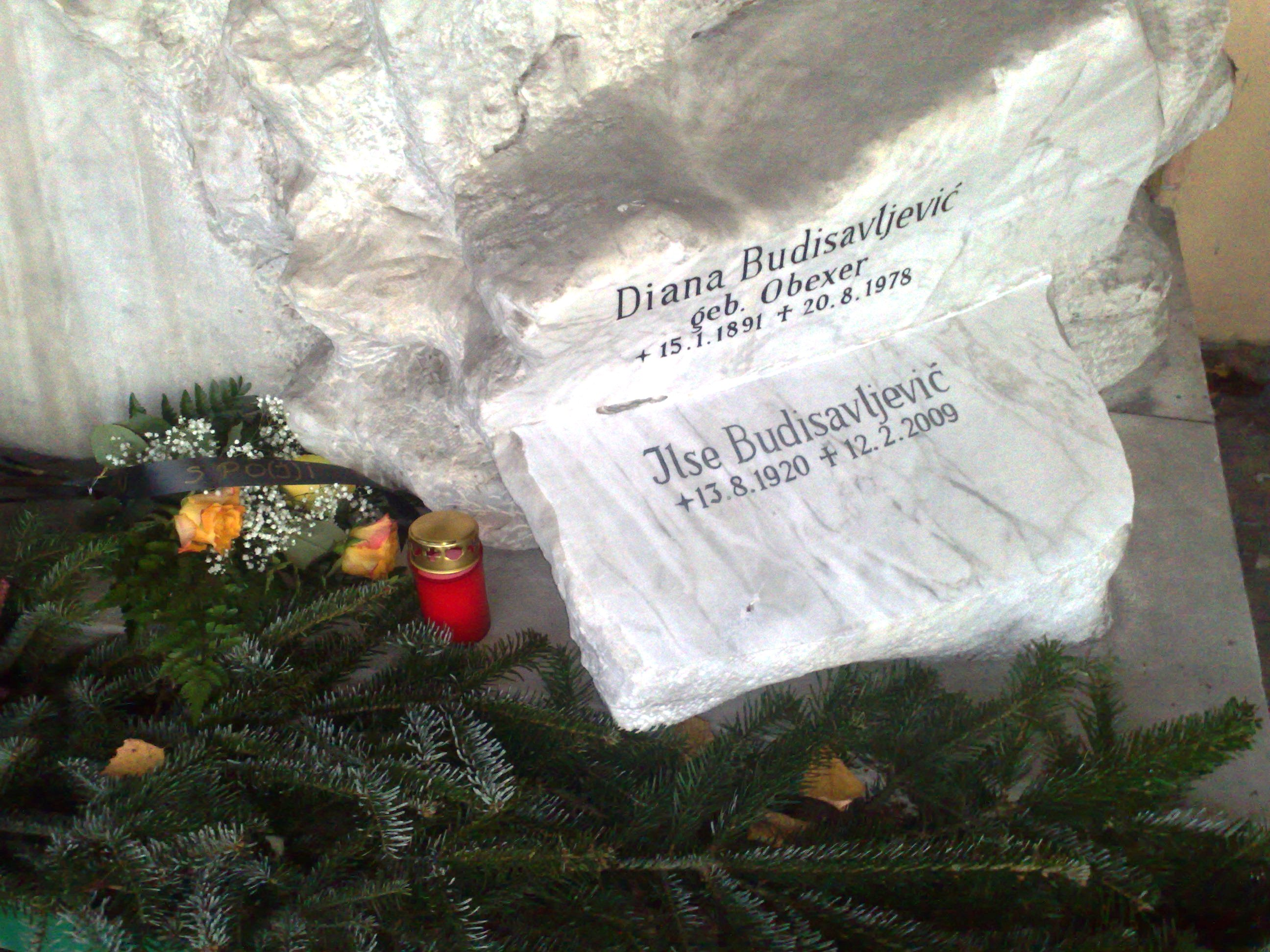 Grab von Diana Budisavljevic und ihrer Tochter Ilse (Teil des Familengrabs)